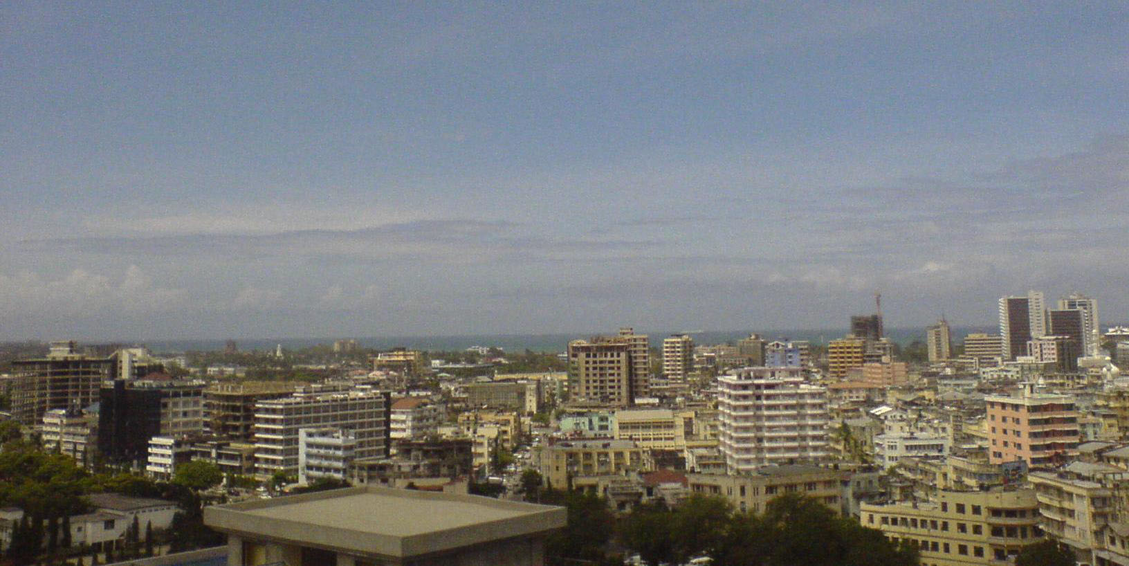 A view of the Dar es Salaam skyline